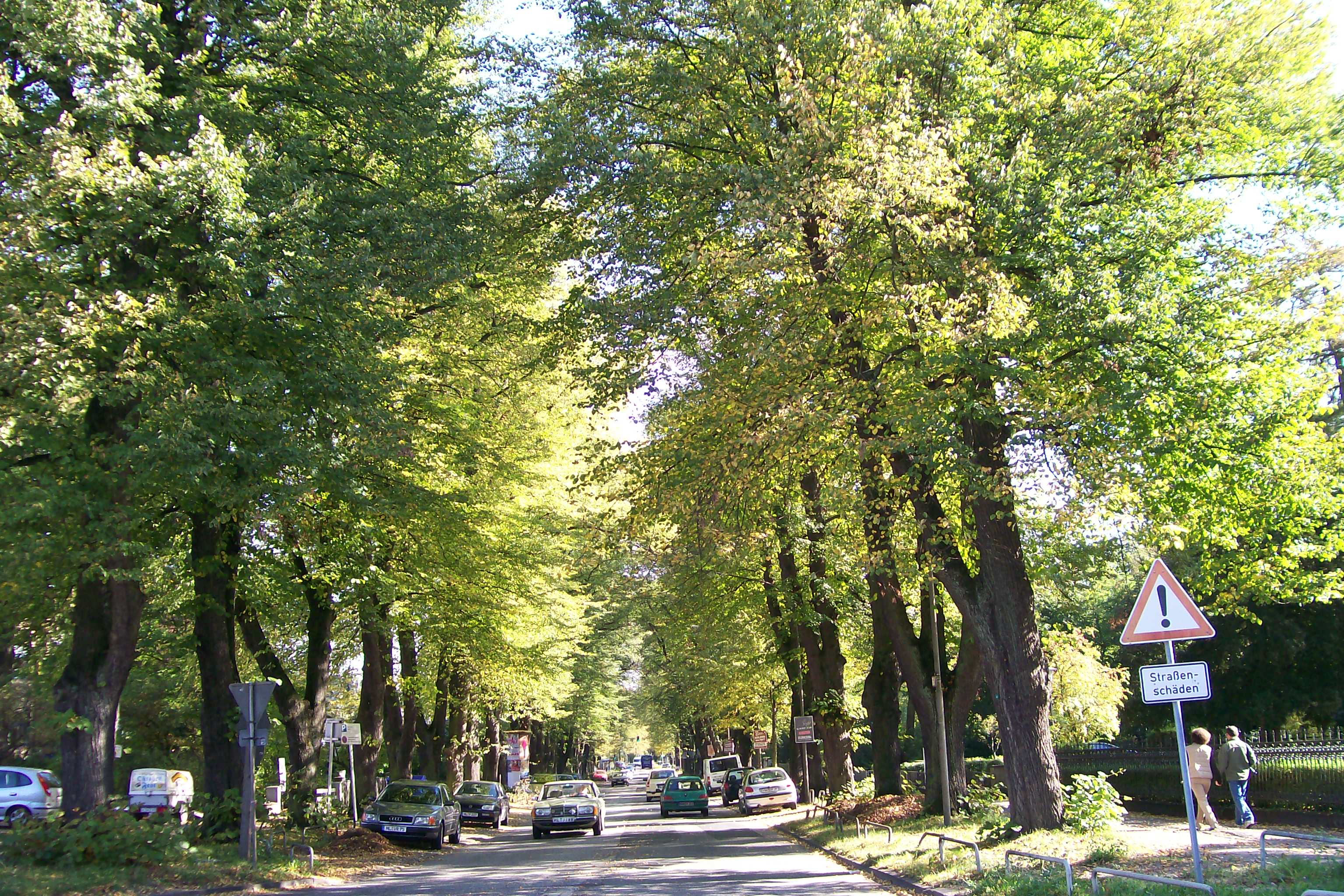 Roeckstraße in Lübeck